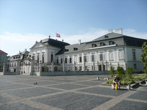 Grassalkovichov palác